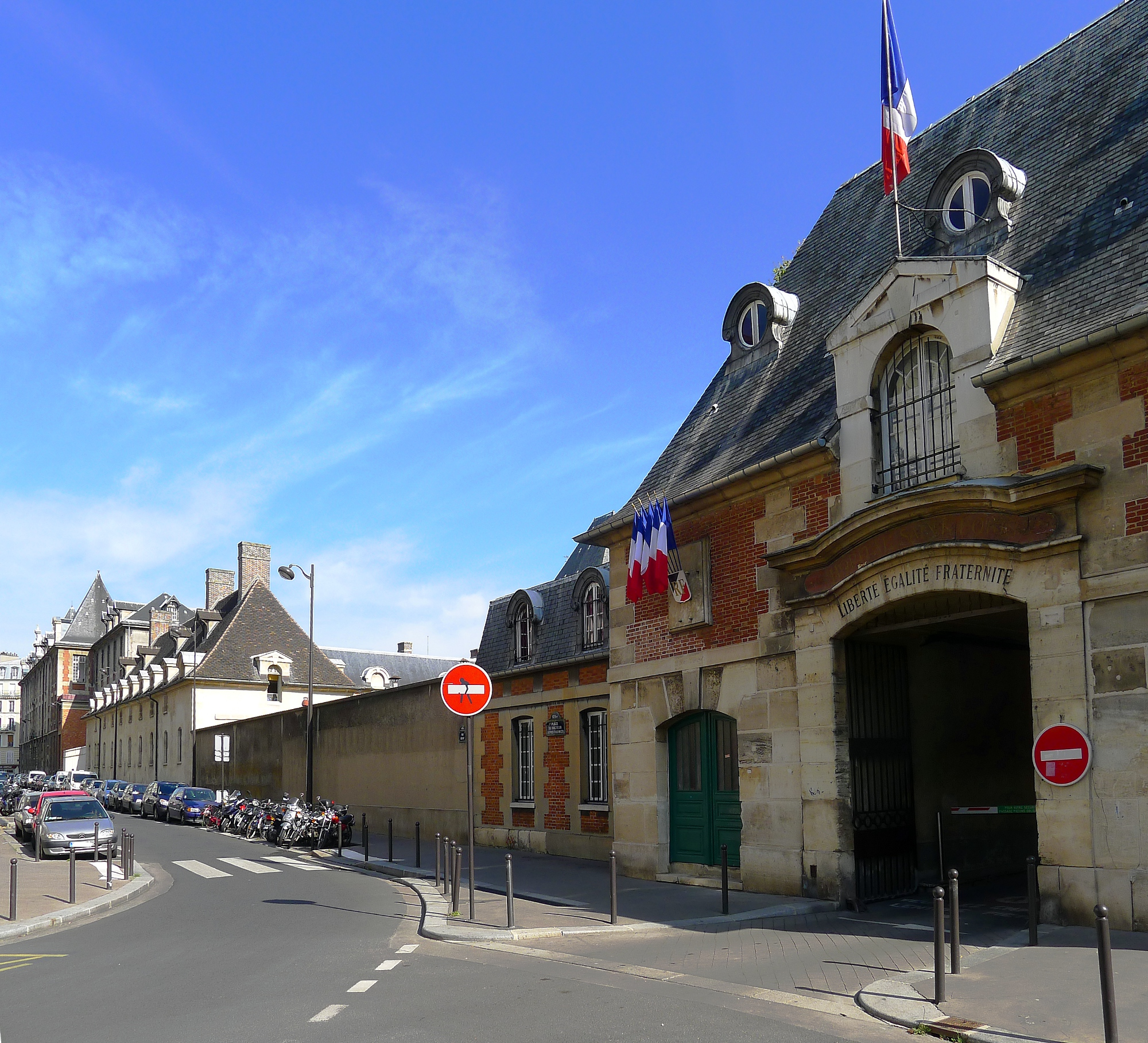 Rue Bichat (hôpital Saint-Louis) - Paris X